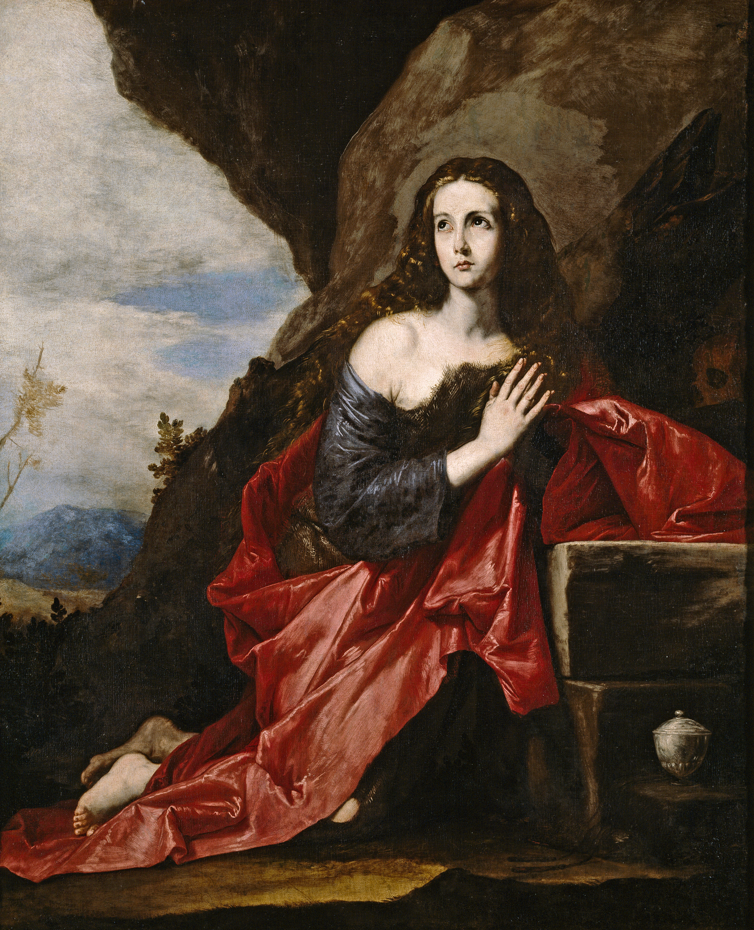 El lienzo muestra a Santa María Magdalena, una de las seguidoras de Jesucristo más cercanas a él, en actitud arrepentida y haciendo penitencia por sus pecados.